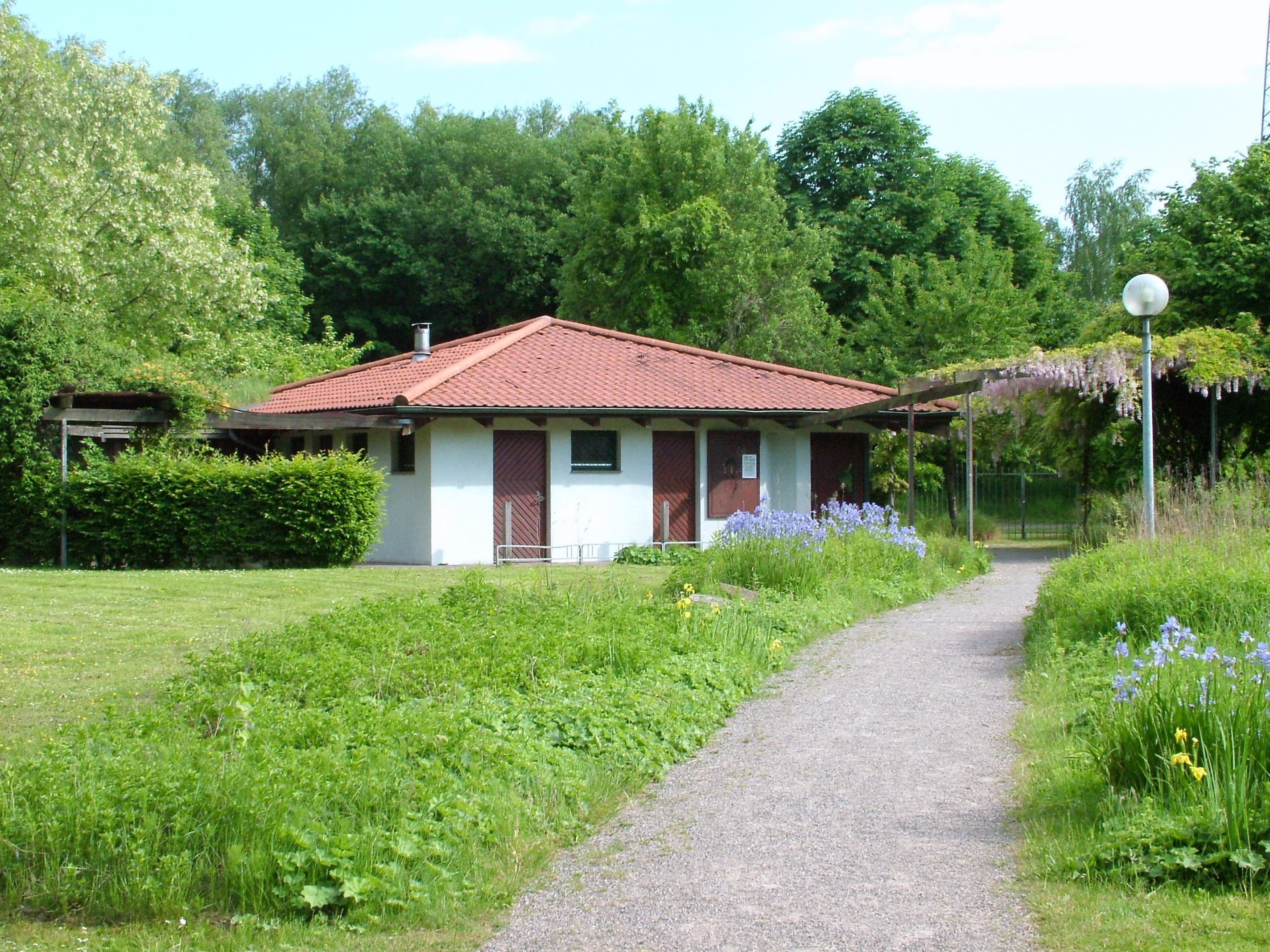 Gladbeck-Rentfort: Stadtgarten Johowstraße